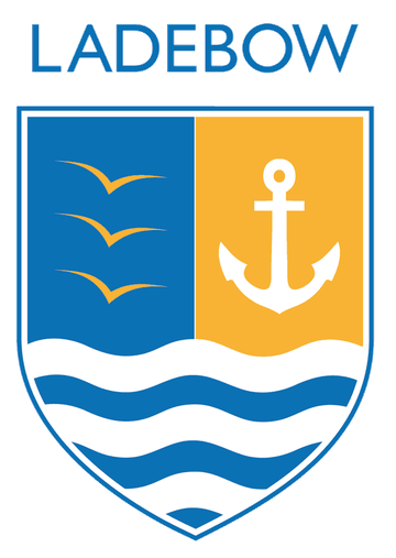 Ortslogo des Ortsteils Ladebow der Hansestadt Greifswald (Wappen dürfen Ortsteile nicht führen) Quelle: ladebow.de